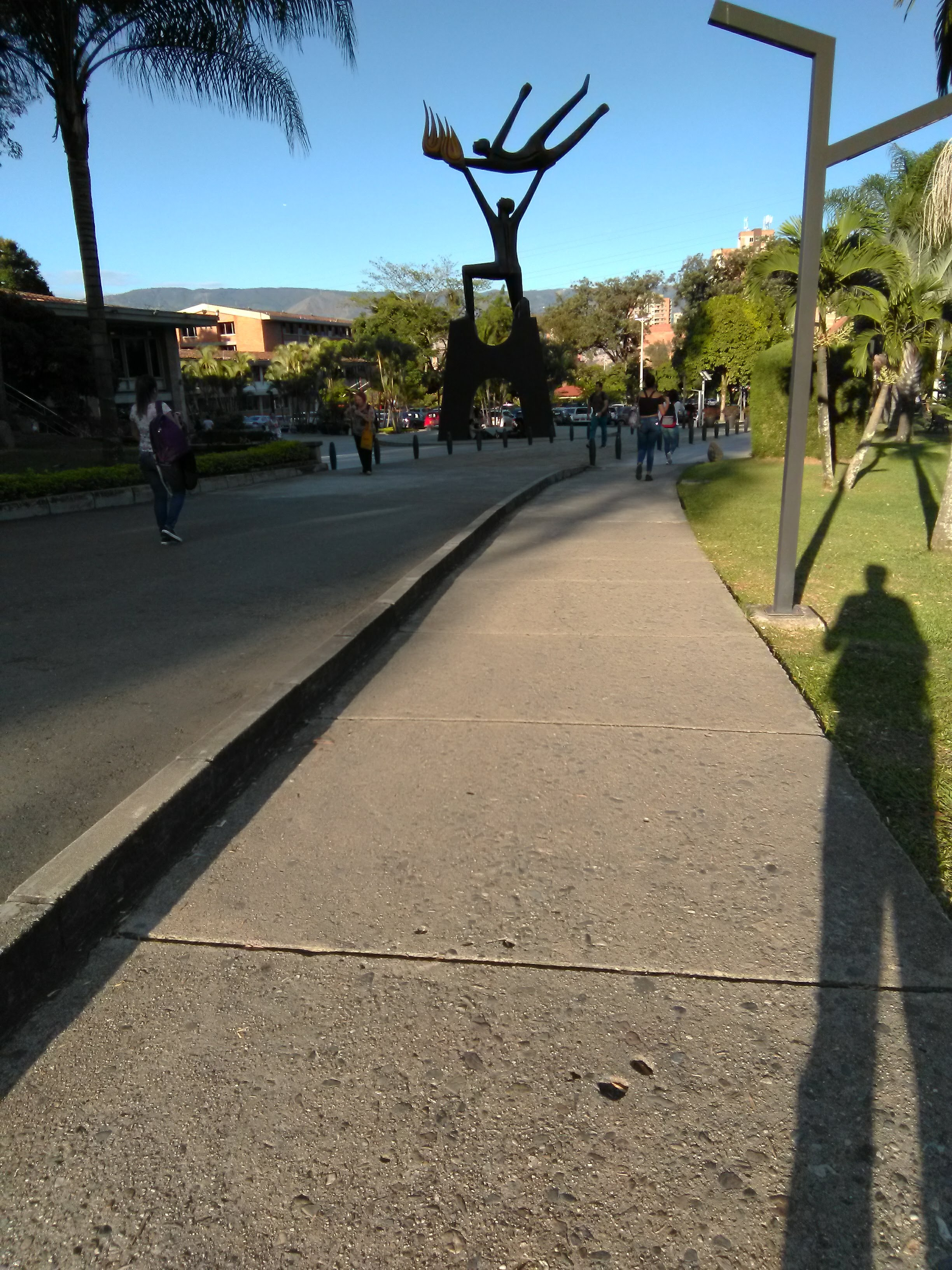 Plaza Prometeo.